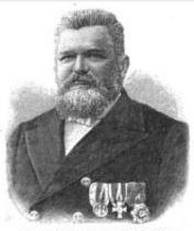 Adalbert Krech (1852-1907), seemännischer Leiter der Valdivia-Expedition 1898/99 Depicted person: Adalbert Krech